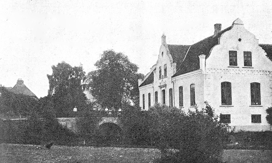 Vejrupgård er en gammel gård, som nævnes første gang i 1300 og kaldt Vetorp. Gården ligger i Marslev Sogn, Bjerge Herred, Langeskov Kommune. Hovedbygningen er opført i 1614.